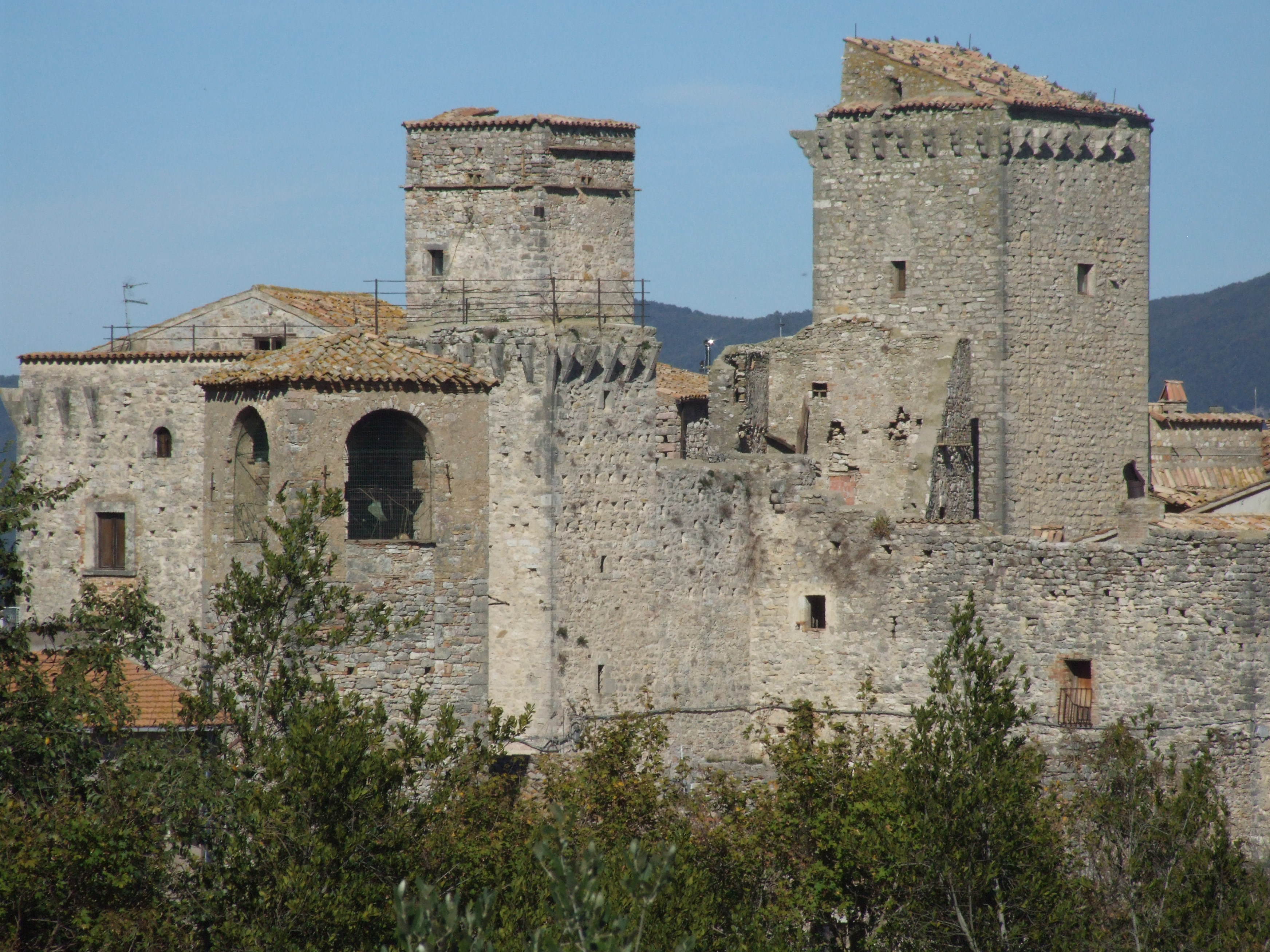 Castello di Barattano This is a photo of a monument which is part of cultural heritage of Italy.